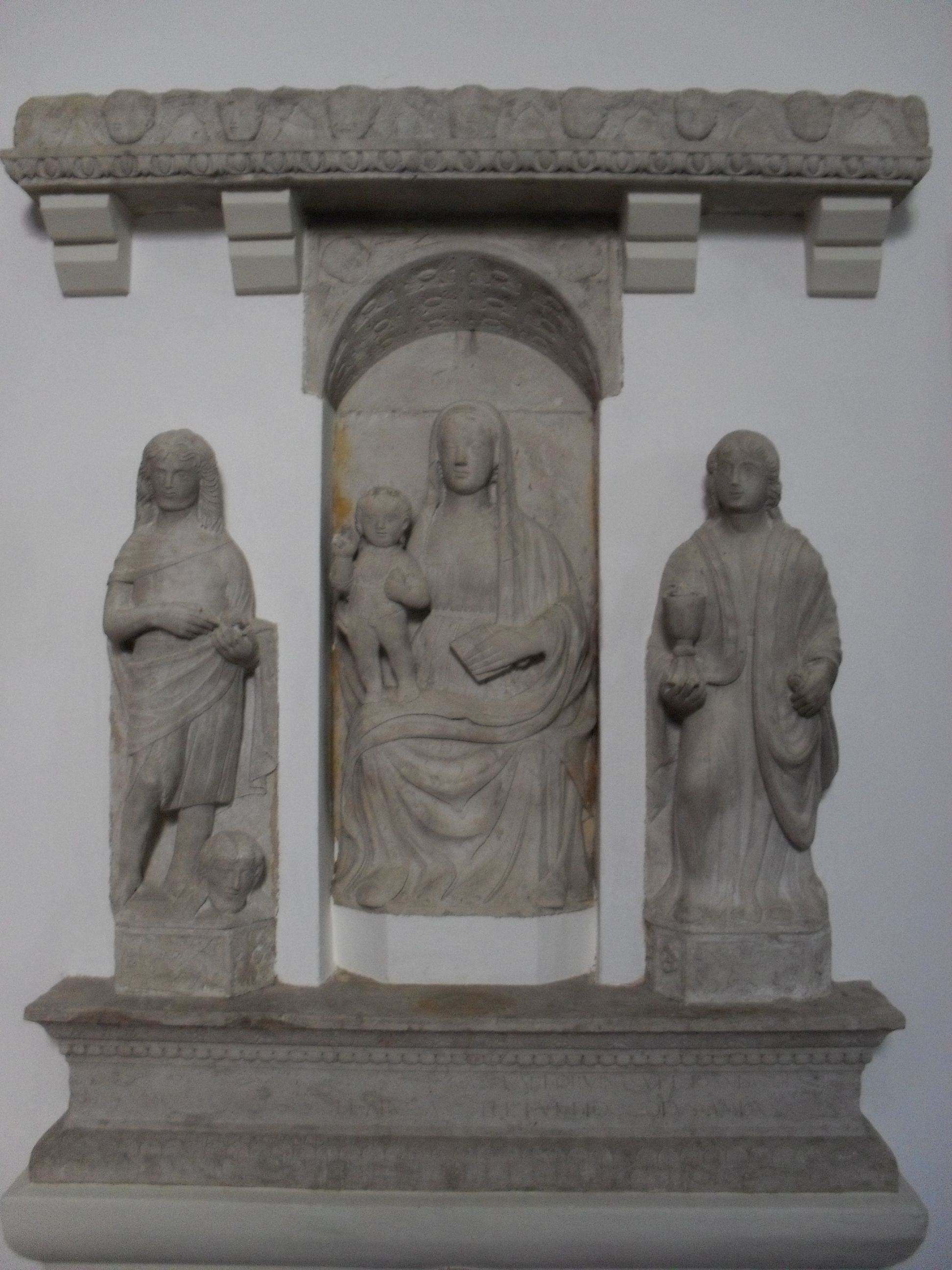 Furlan: Glesie di Rose - sculturis di San Zuan Battiste, Madone cun Frutut, San Zuan Vanzelist, sculpìdis da Antoni Pilacorte. Recuperàdis da glisiute di San Zuan de Passarize, distrute dal Tiliment in plene